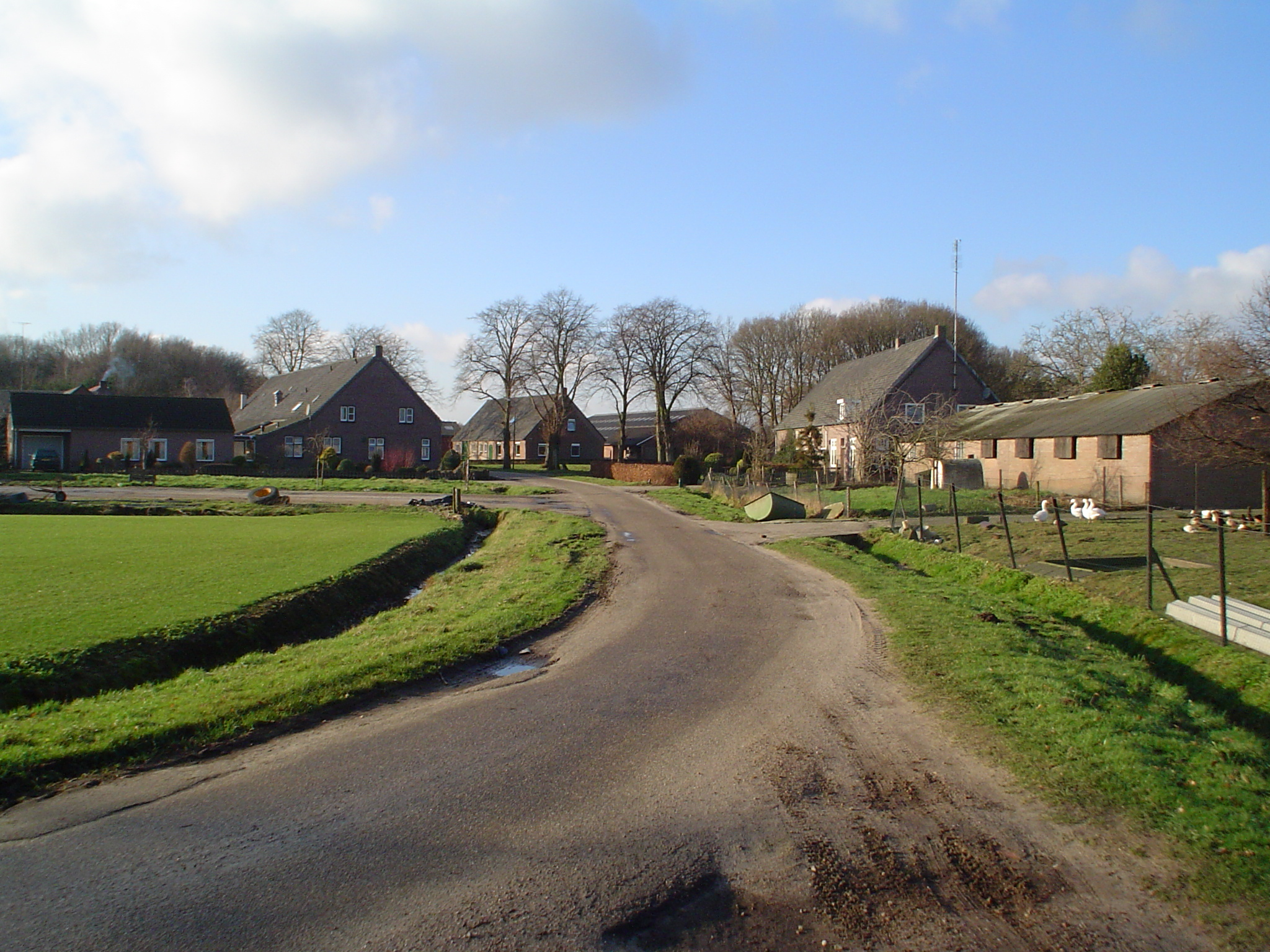 Het gehucht Halfmijl in de gemeente Veldhoven, gezien vanuit het oosten.